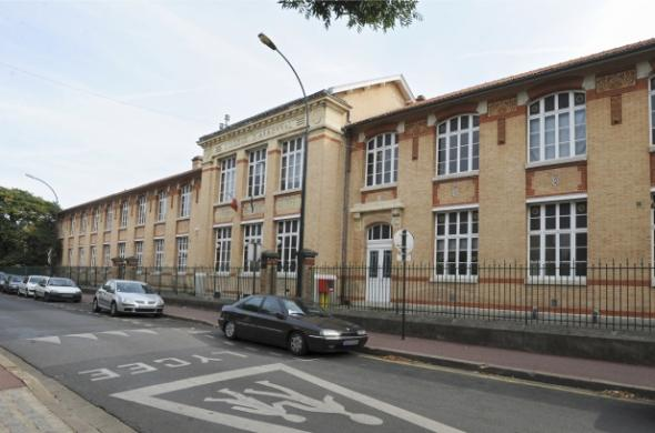 Batîment Bollier